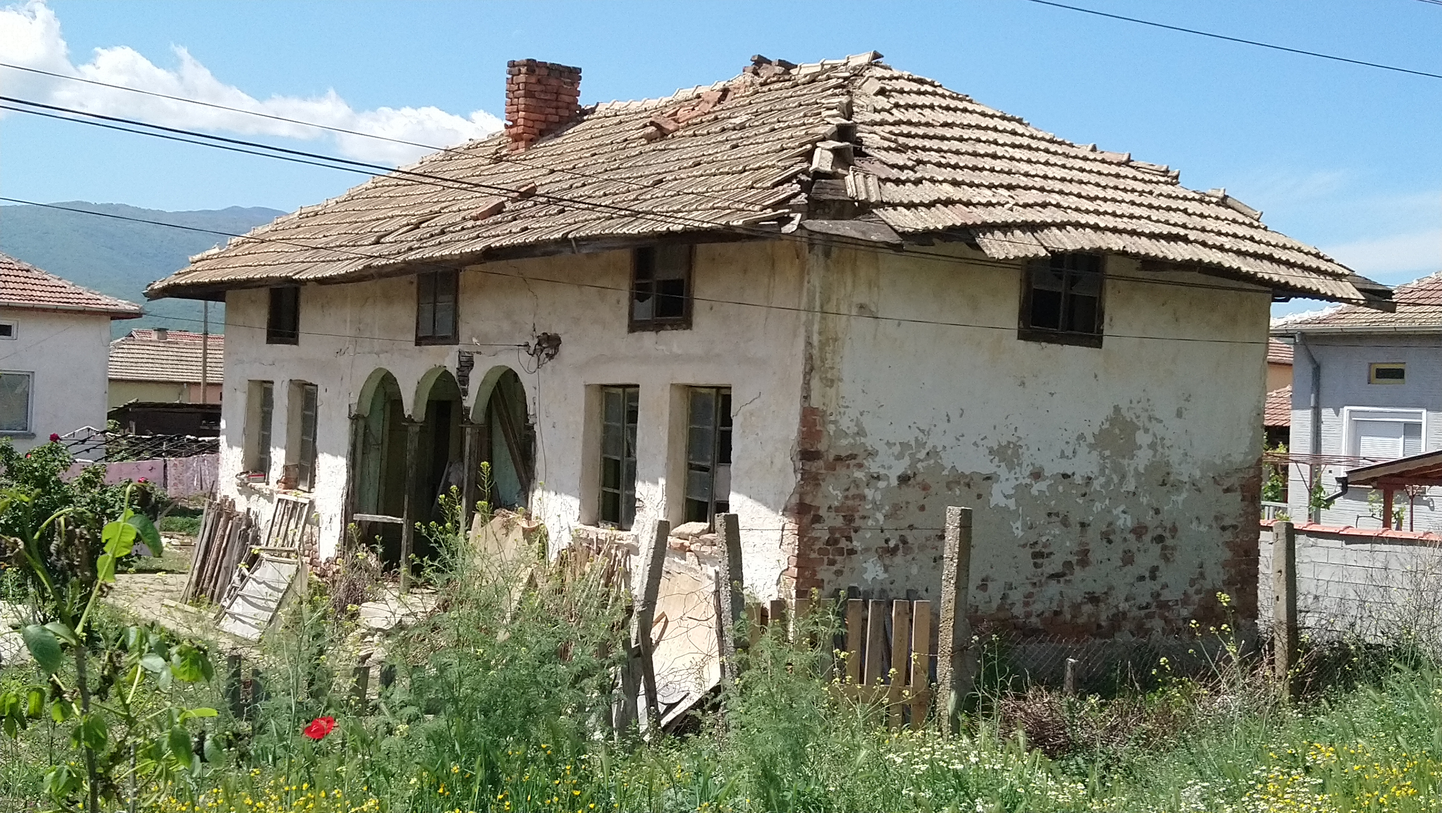 Стара къща в село Марино поле